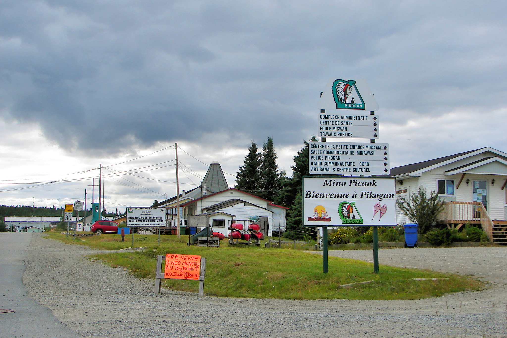 Pikogan, Quebec, Canada